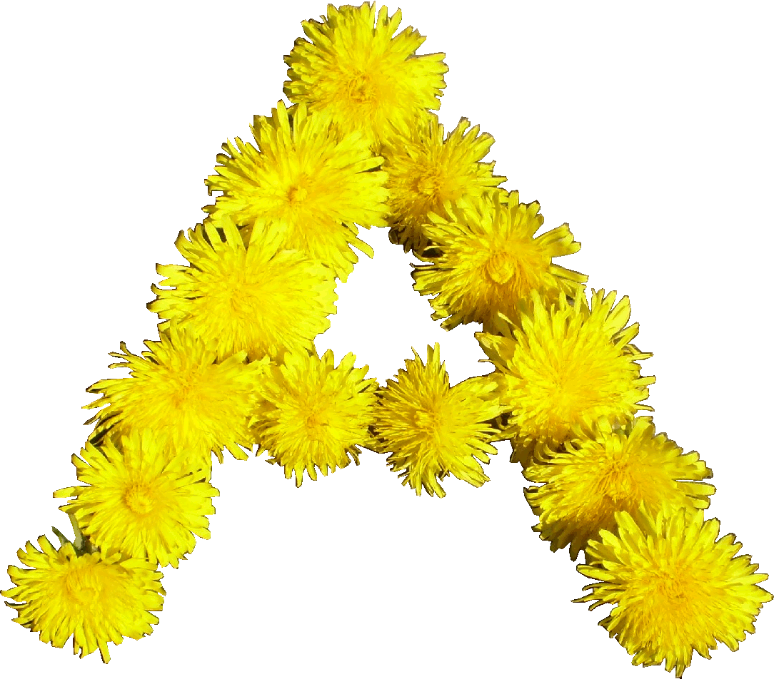 Der Buchstabe A aus Blüten des Löwenzahns gebildet